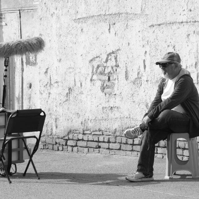 علی حجازی مهر ، تهیه کننده تلویزیون